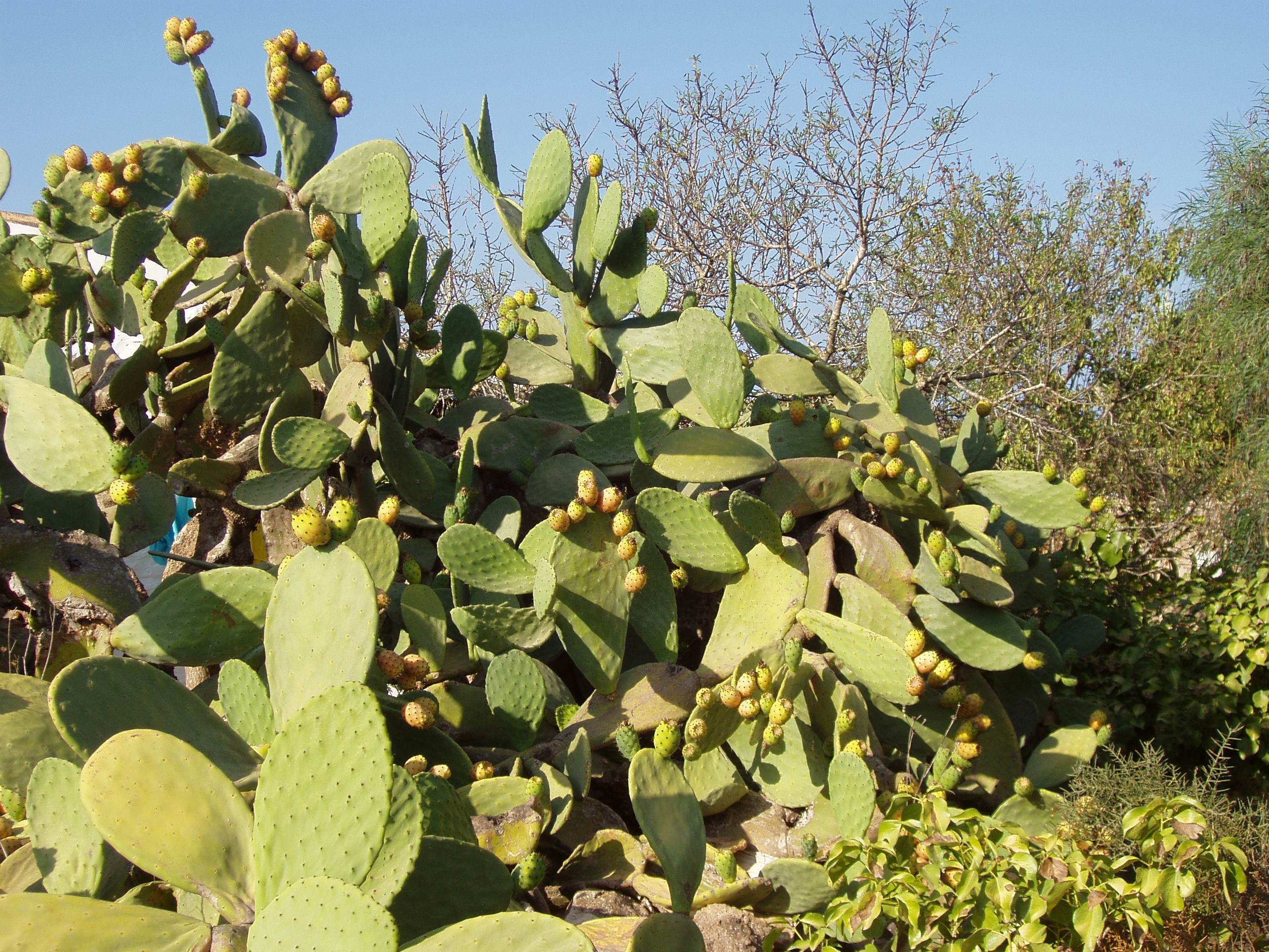 Ejemplar de chumbera (Opuntia ficus-indica). Isla de Formentera , Baleares, España.